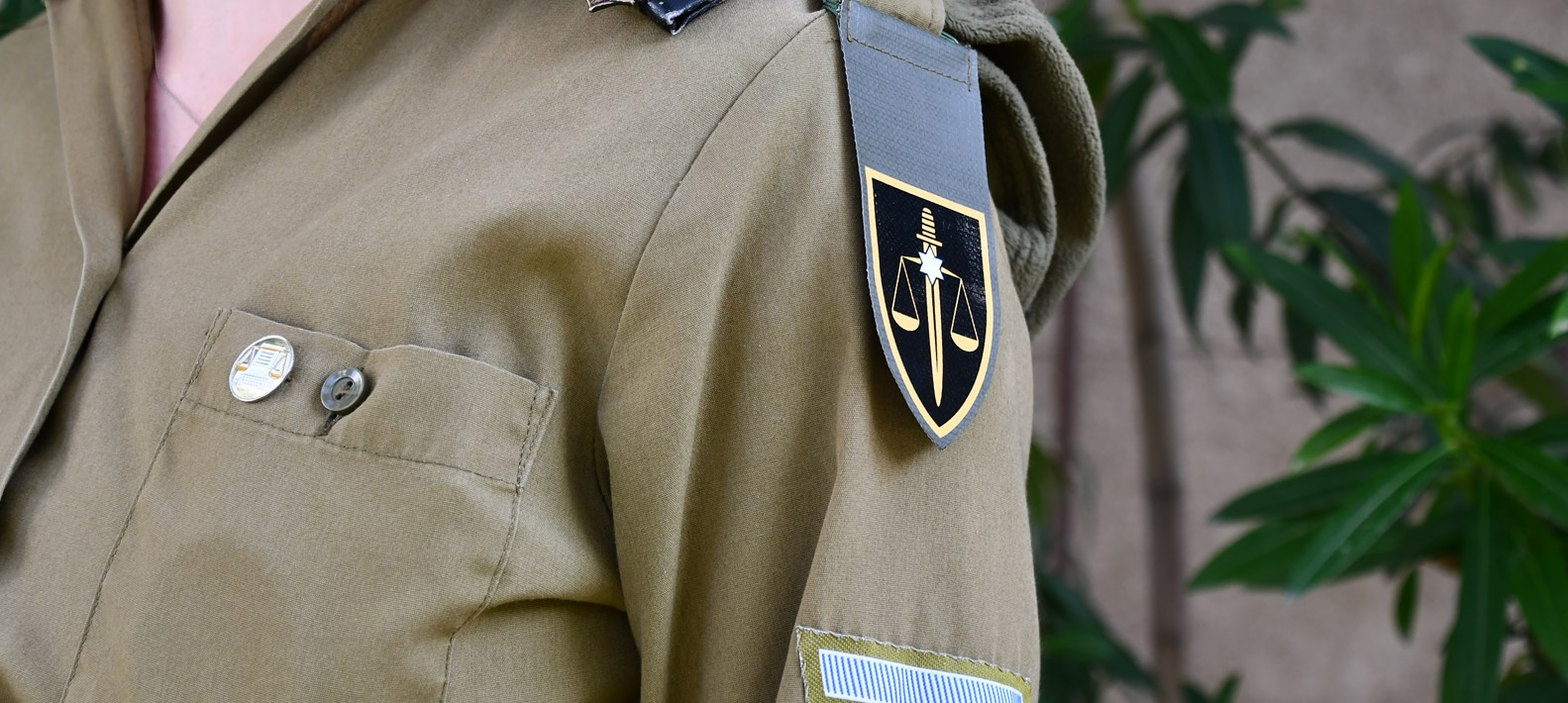 תג יחידת בתי הדין הצבאיים